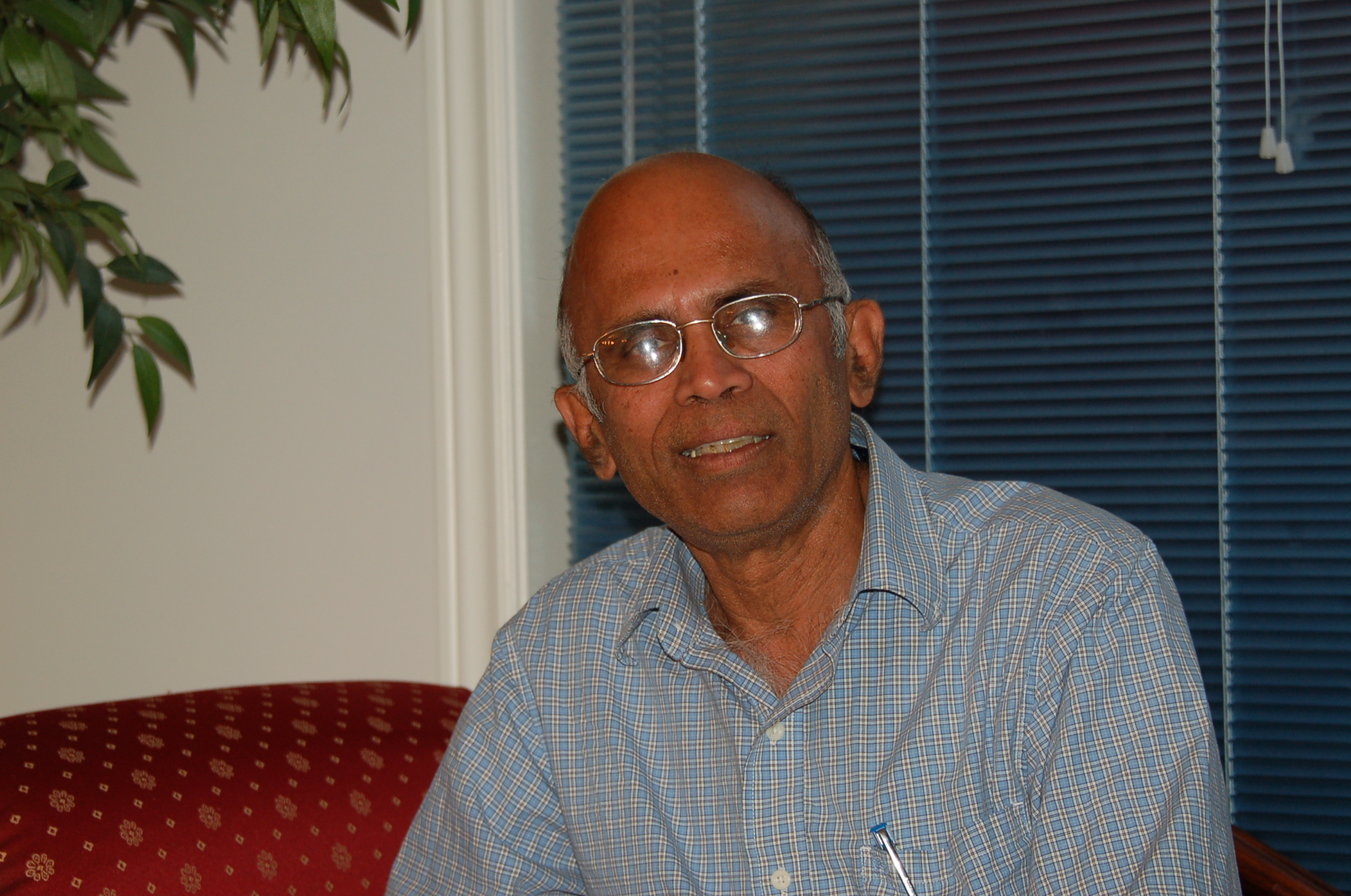 அறிவியலாளர் க. பாசுக்கரன் அவர்களின் படம். Scientist G. Baskaran's photo